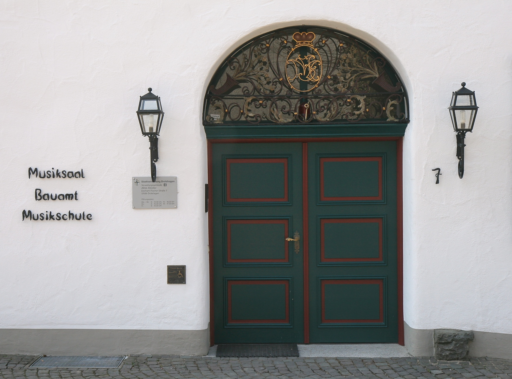 Altes Kloster in Drolshagen. This image shows a heritage building in Germany, located in the North Rhine-Westphalian city Drolshagen (no. 2).